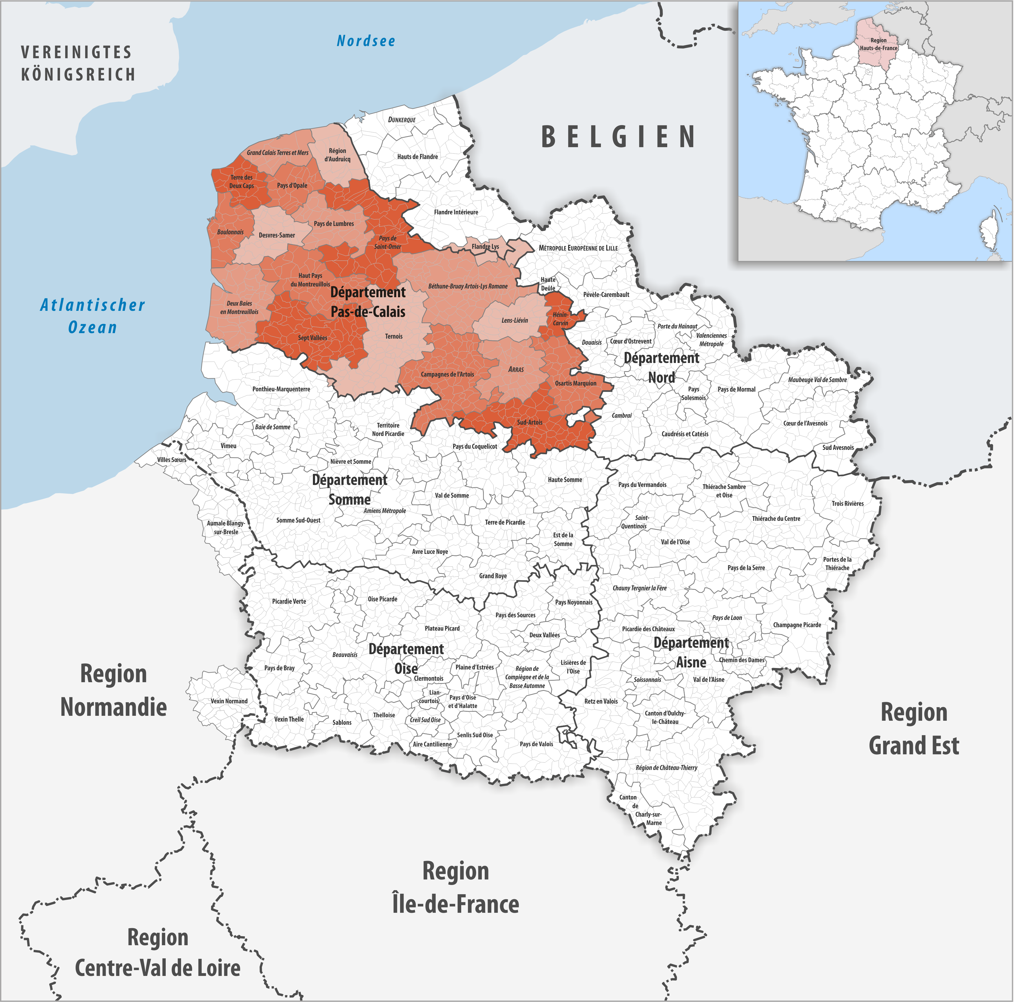 Gemeindeverbände im Département Pas-de-Calais